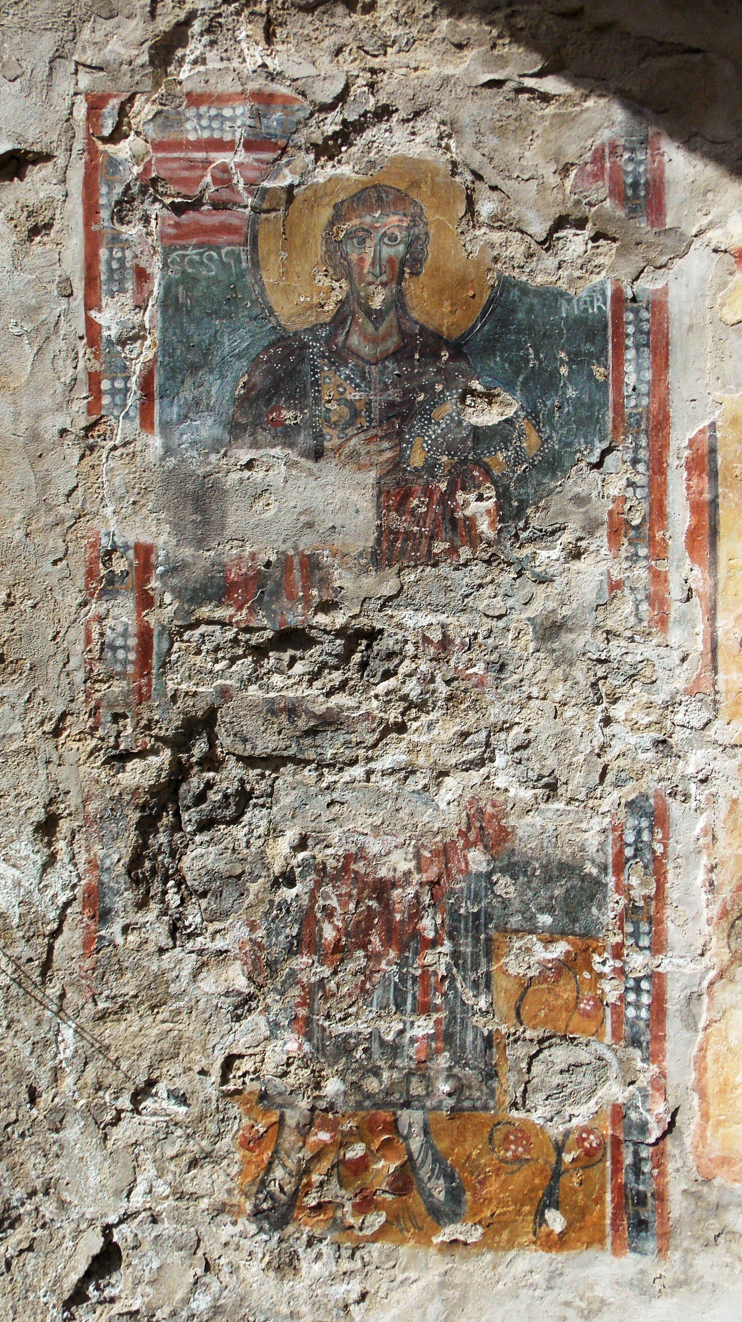 I ruderi dell'abside dell'oratorio di San Giorgio a Faicchio (BN) con gli affreschi, dipinti fra il X e il XV secolo